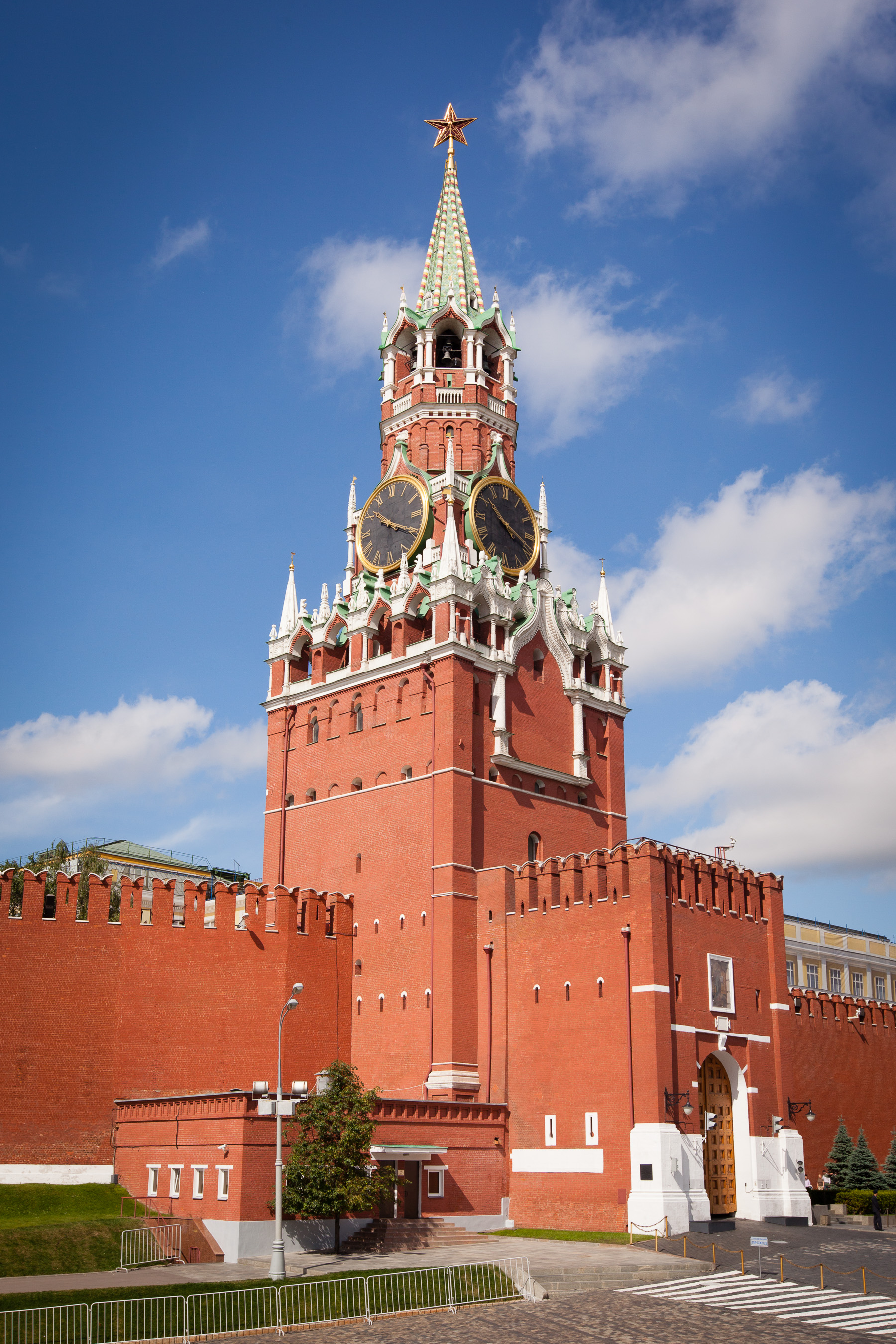 Moscow